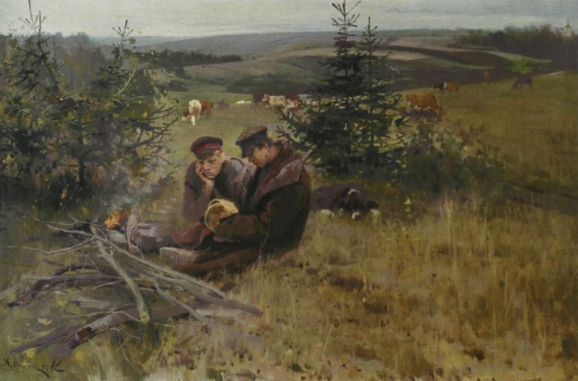 «Пастушки»